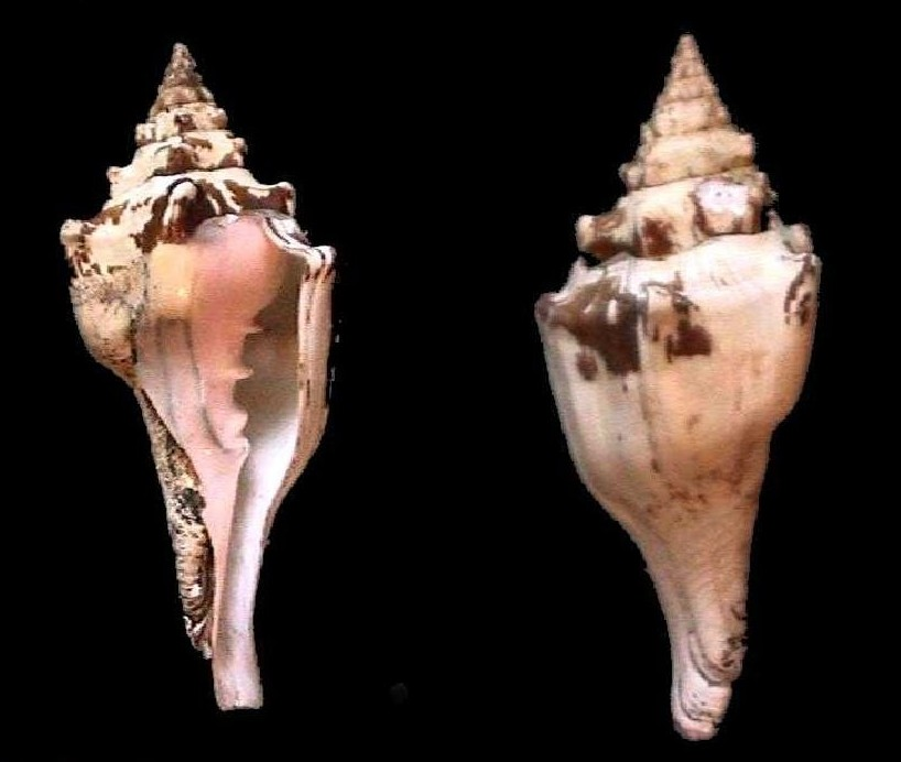 Xancus angulatus de Isla de Patos, Dependencias Federales - Venezuela.